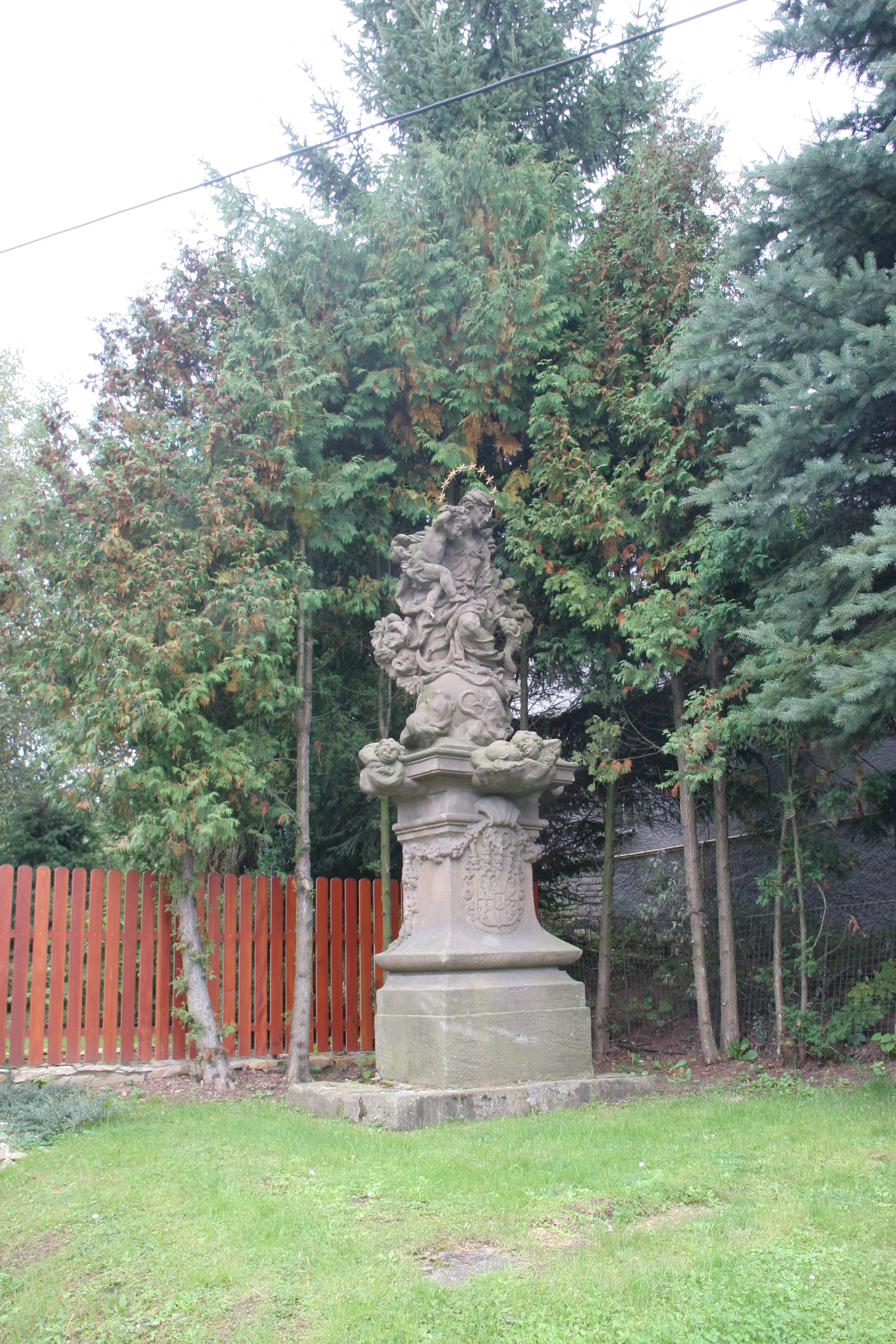 Socha Panny Marie, náves, Velká Bukovina (Chvalkovice).